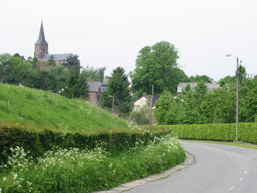 Vue de l'est